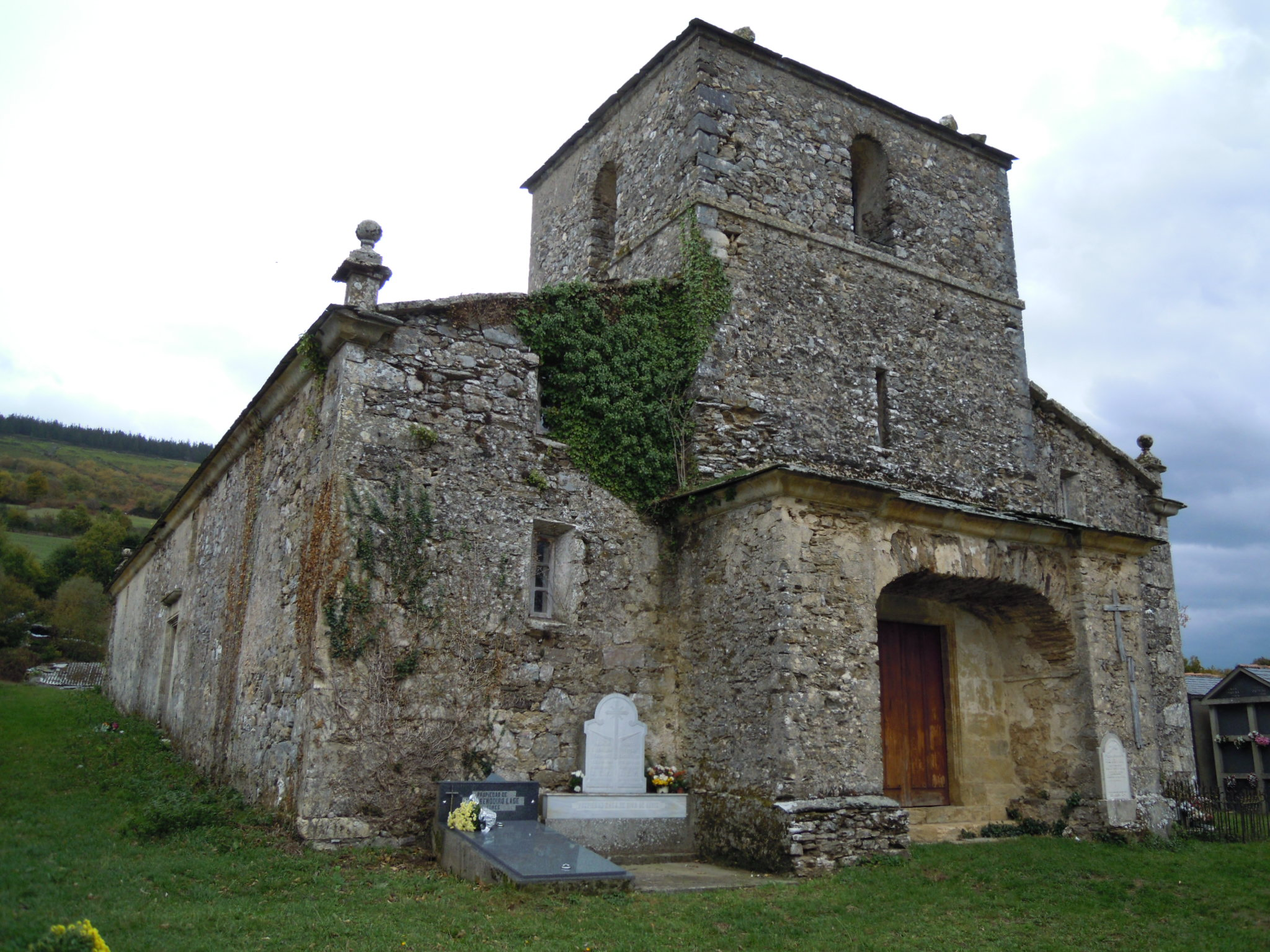 Igrexa parroquial de Torés (As Nogais).